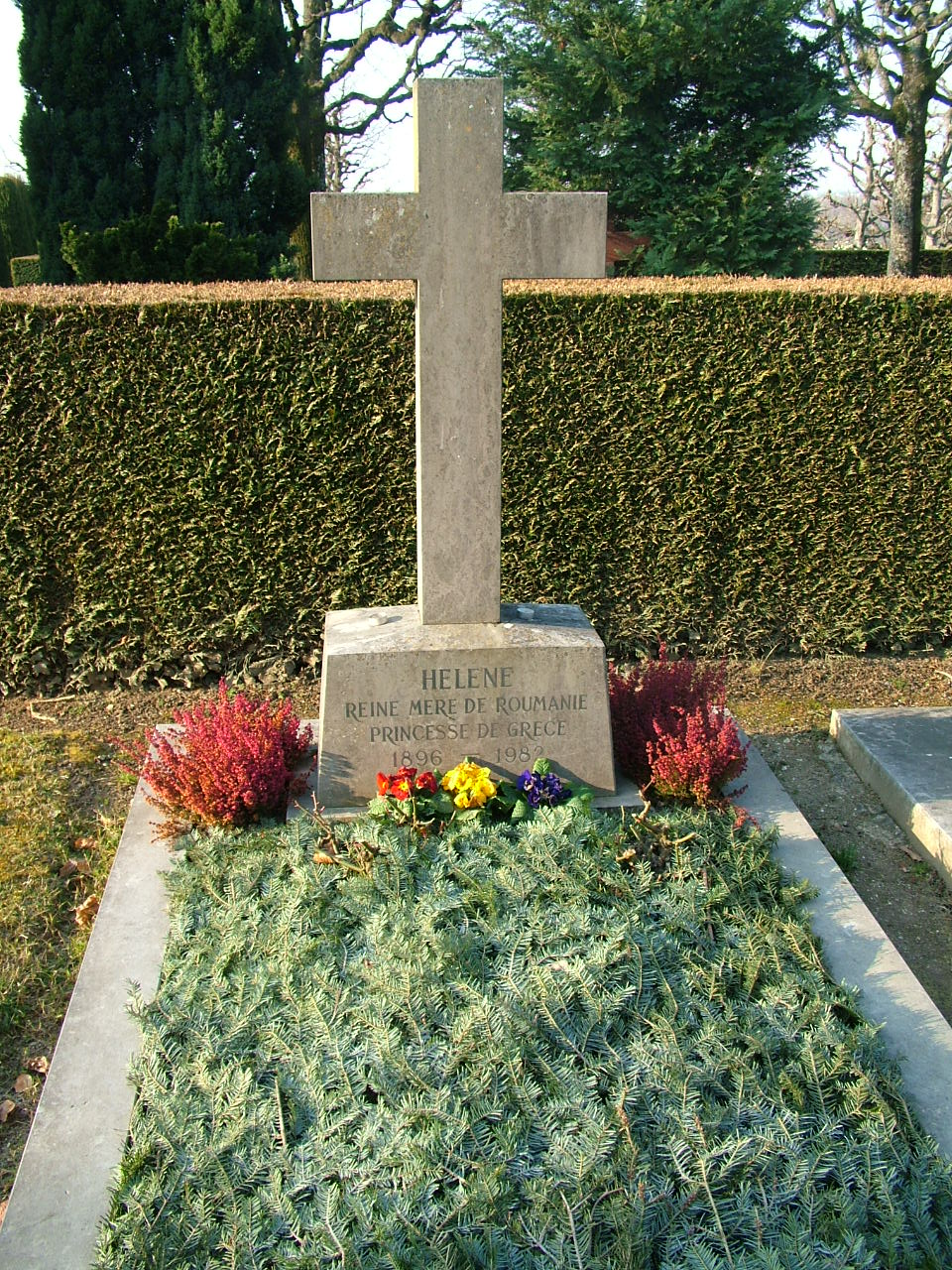 Grab von Elena von Griechenland